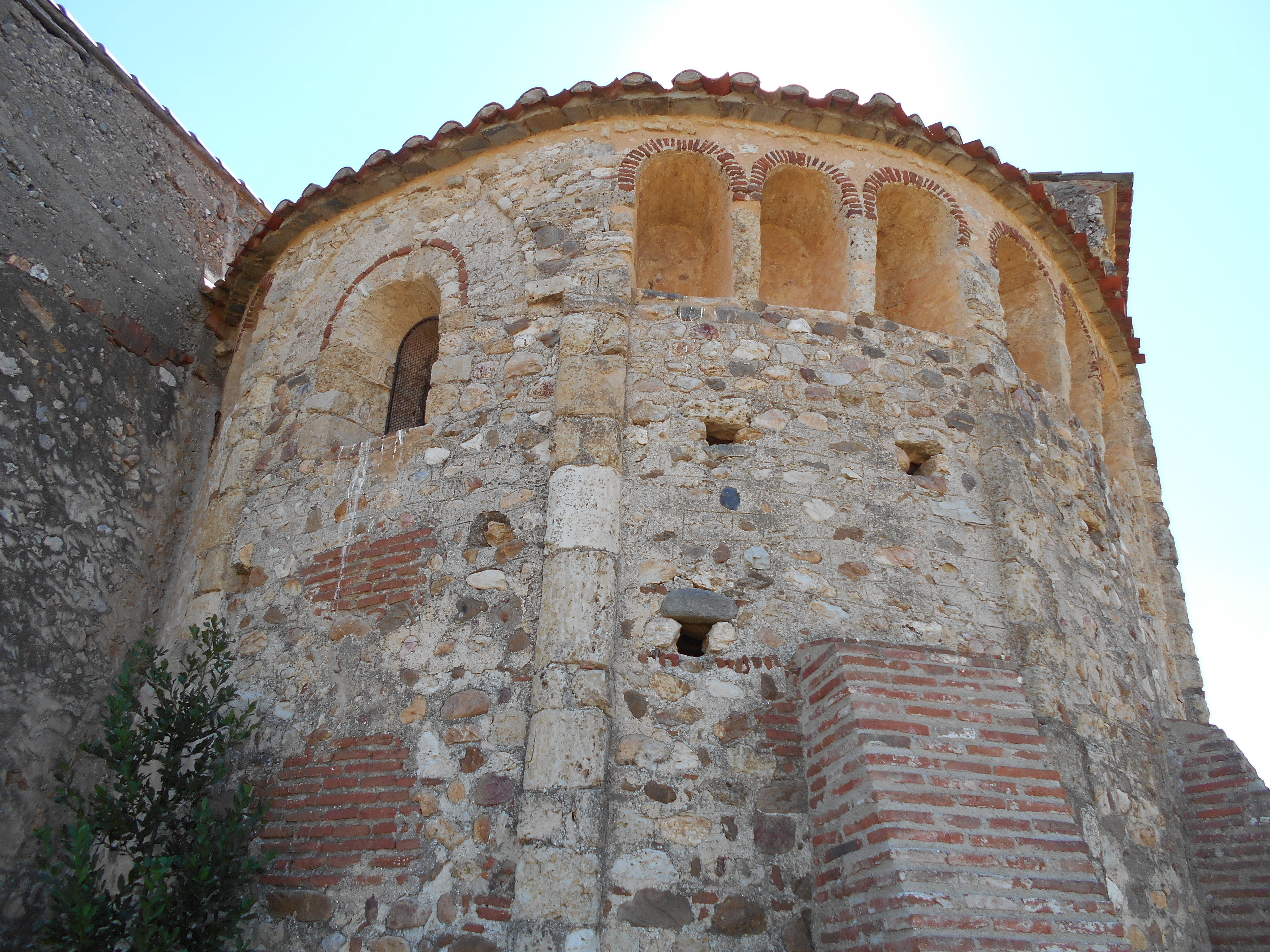 Absis.